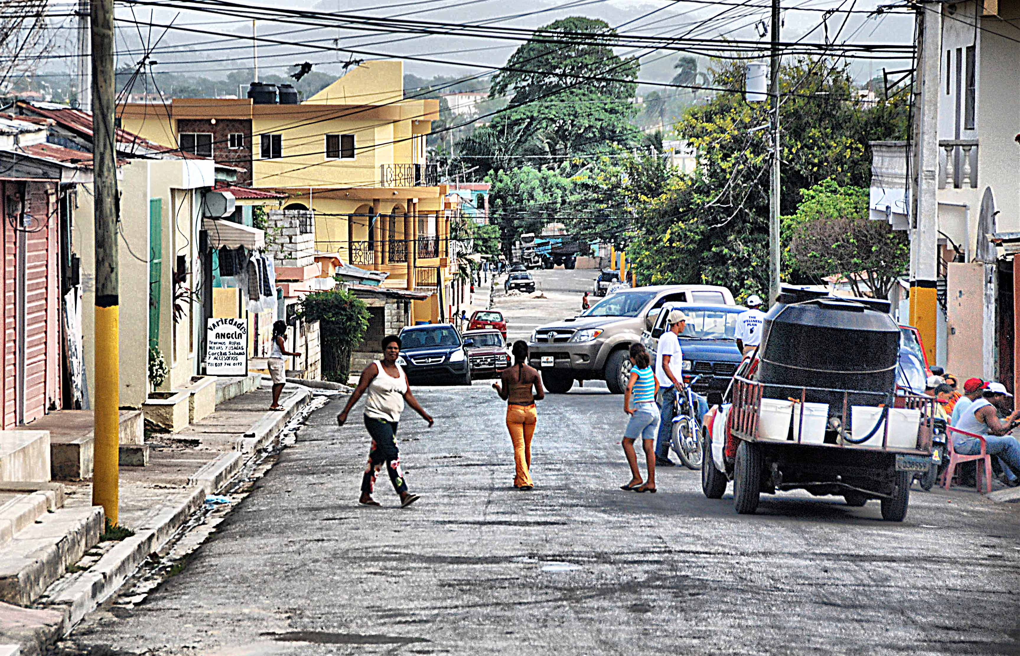 Paisaje urbano de Higuey, localidad de la República Dominicana.